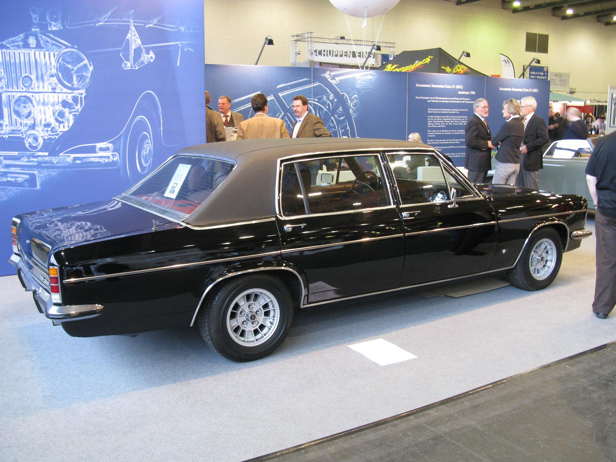 Opel Diplomat V8 Langversion